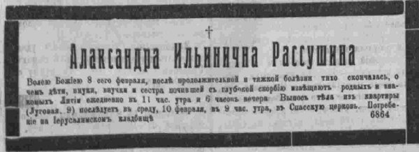 Никролог Александра Ильинична Рассушина